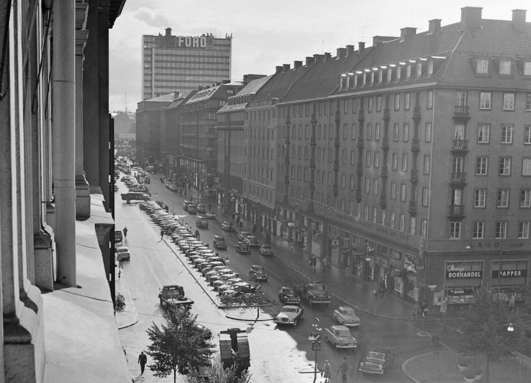 Utsikt över Sveavägen söderut från Bonnierhuset. Bilparkering i gatans mitt, i bakgrunden syns första Hötorgsskrapan